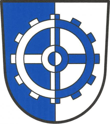 Onšov PE znak